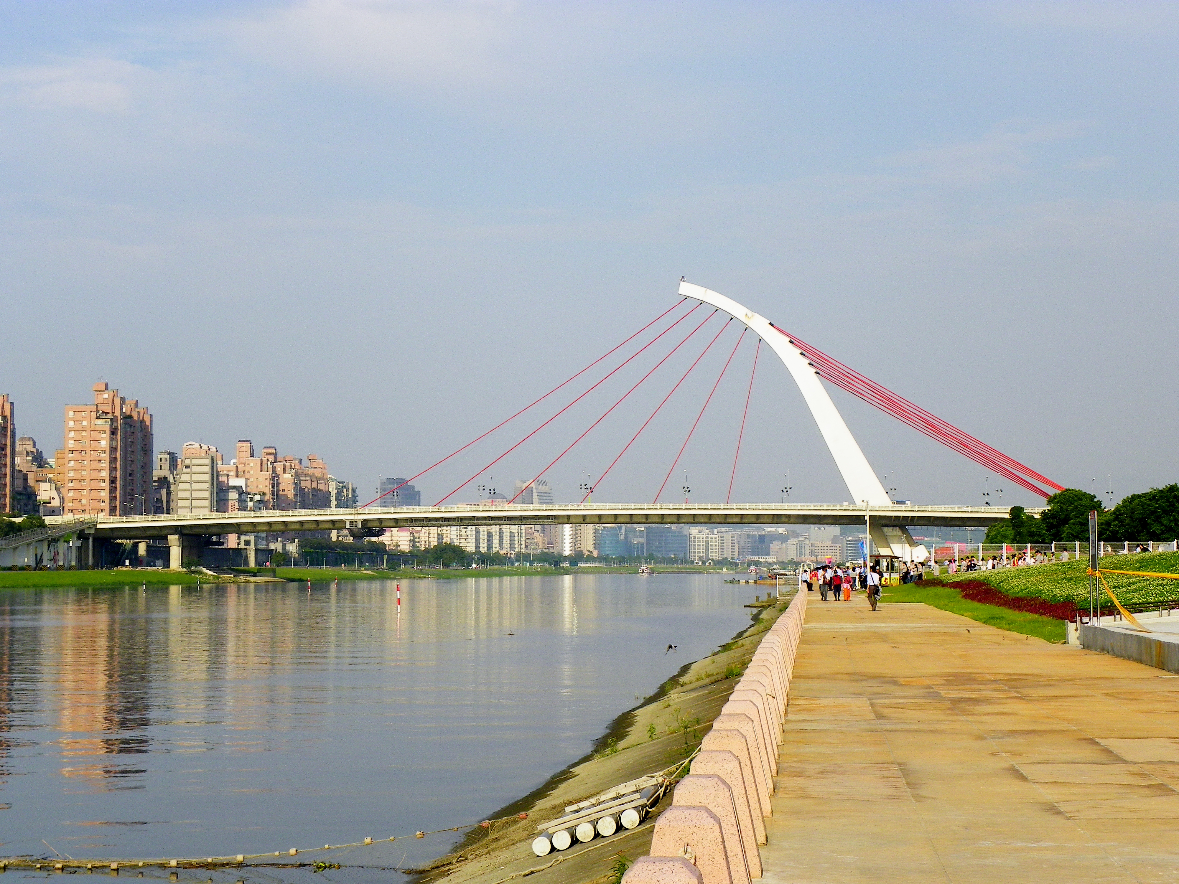 臺北花博最終日，由大佳河濱公園所見之大直橋。